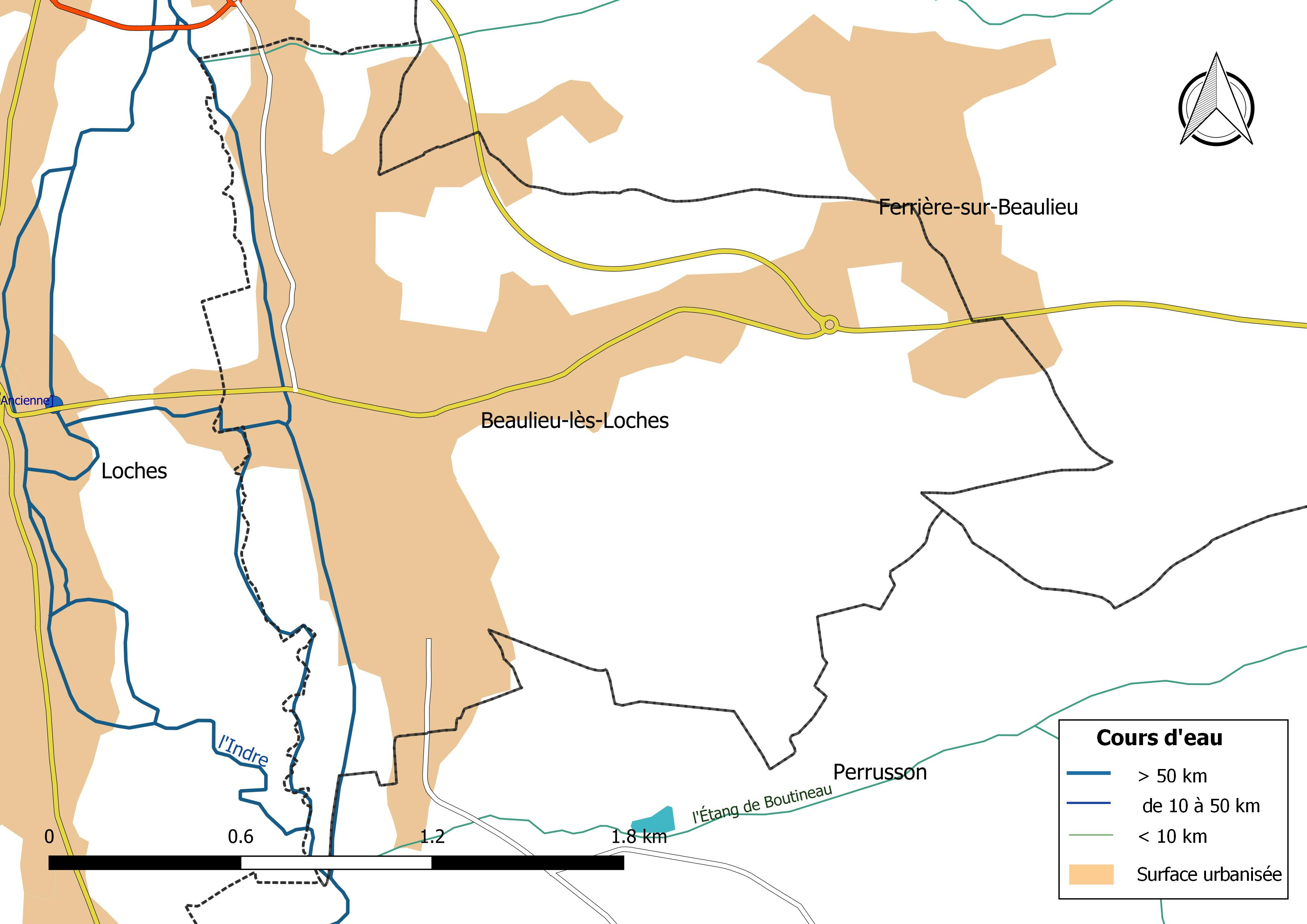 Carte du réseau hydrographique de la commune de Beaulieu-lès-Loches (France).